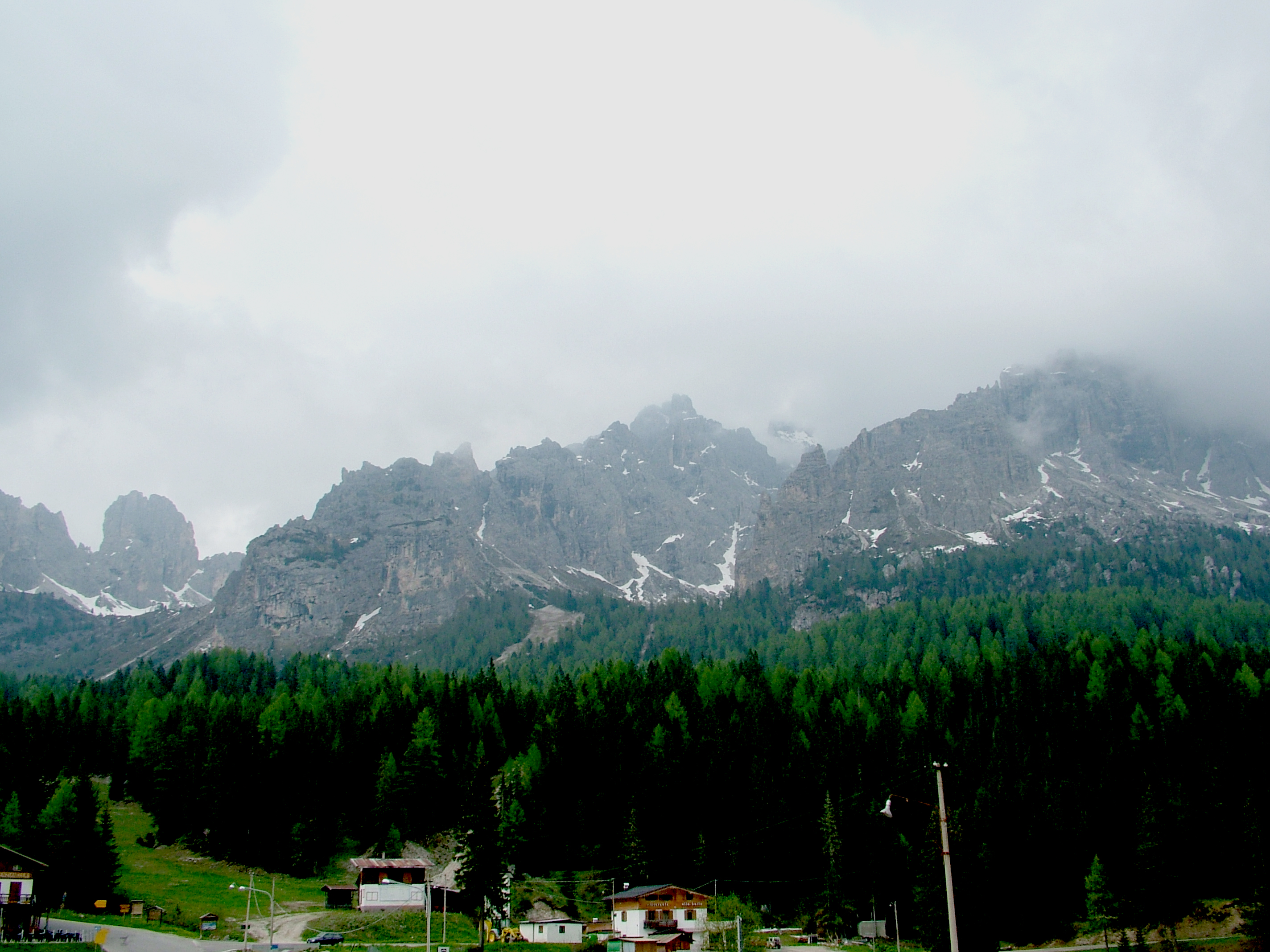 Tre Croci-hágó, Dolomitok (2010), jobbra a Marmolata tömbje (Olaszország)